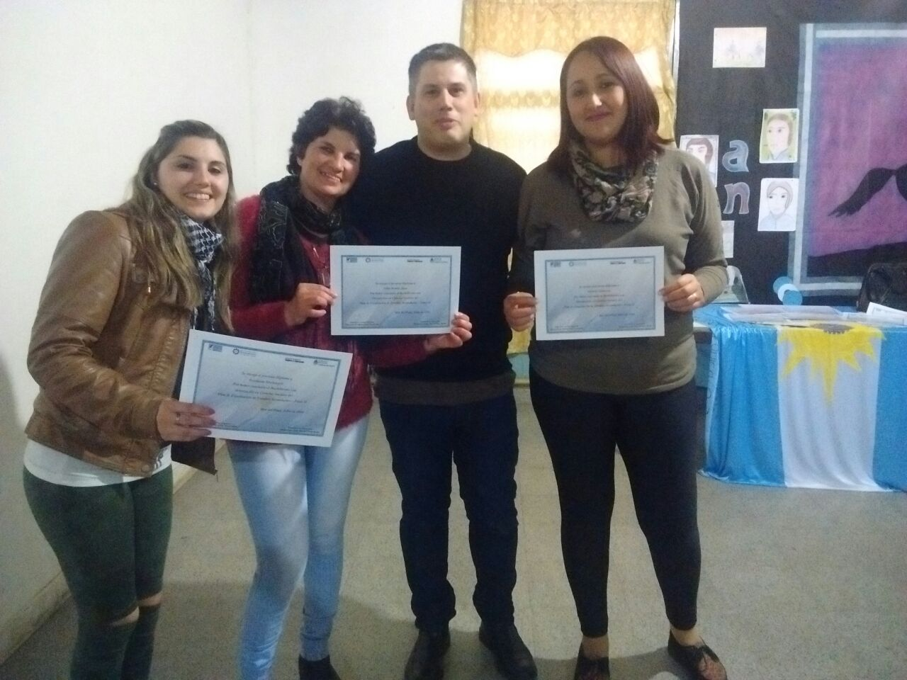 promocion 2016 graduados Plan FINES en la Ciudad de Mar del PLata. Comision 215.Alumnas graduadas junto al Maestro de asistencia Juan Jose Alberto ( Cachango)